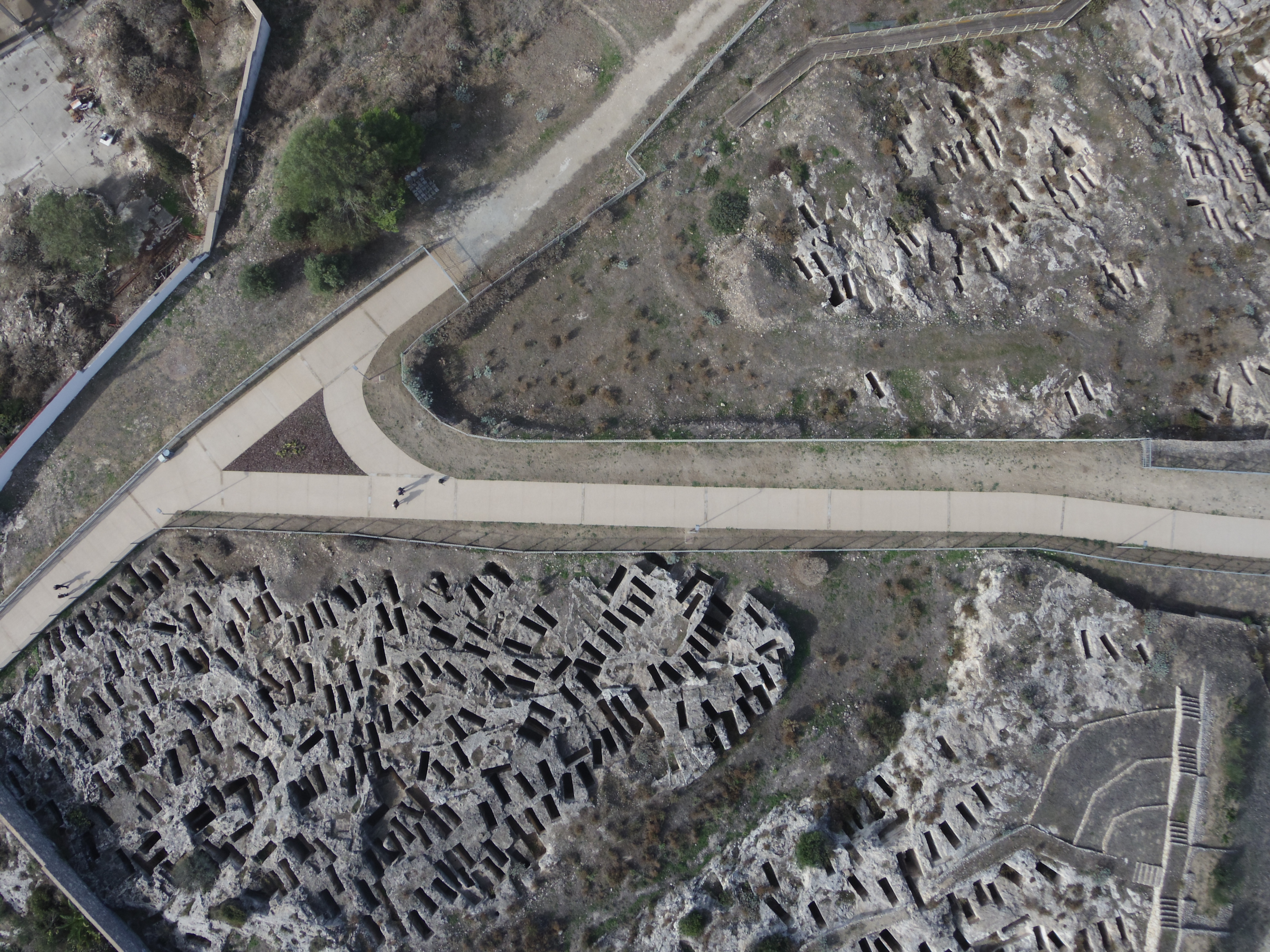 Necropoli di Tuvixeddu This is a photo of a monument which is part of cultural heritage of Italy.